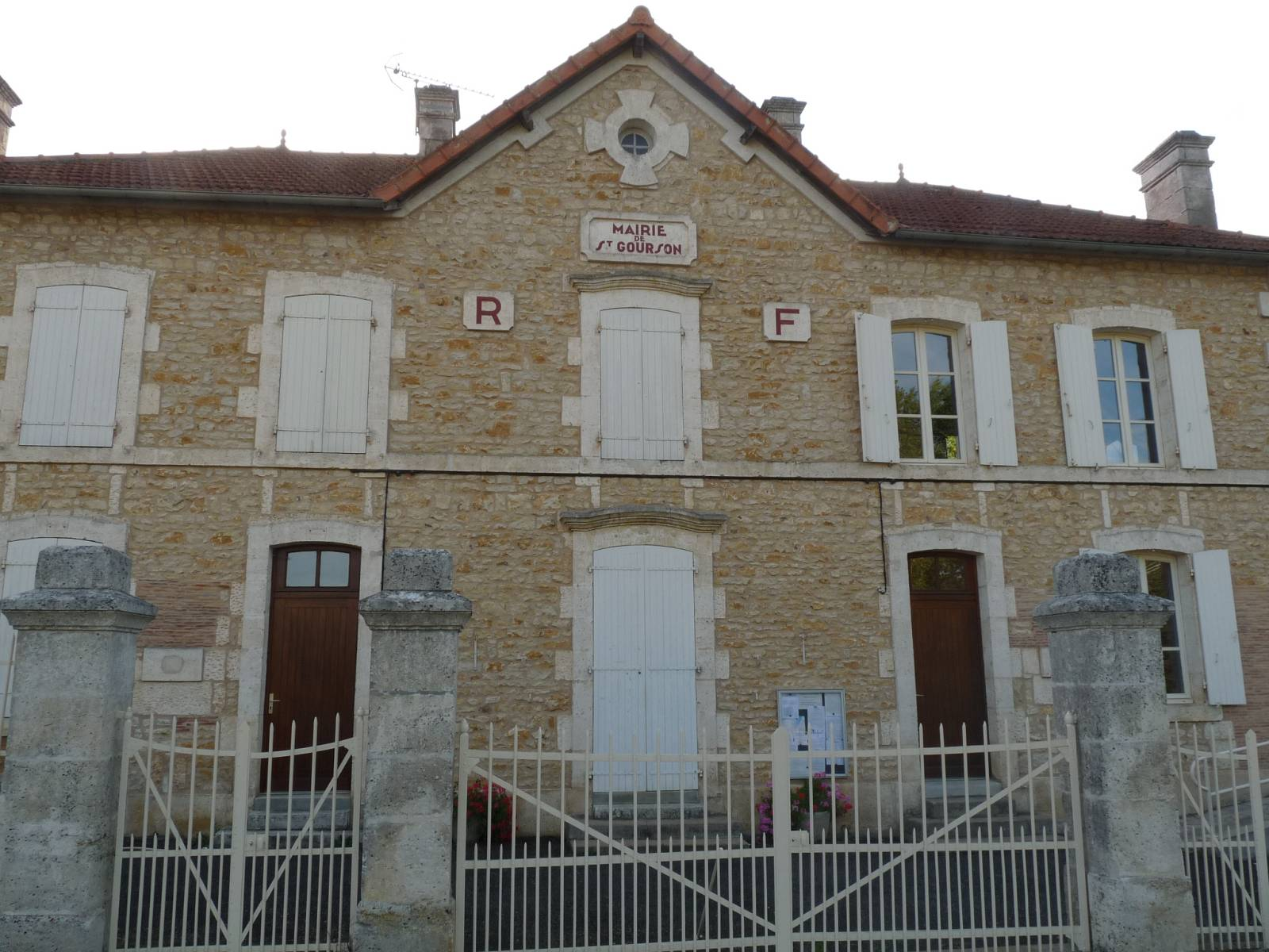 Mairie de St-Gourson, Charente, France